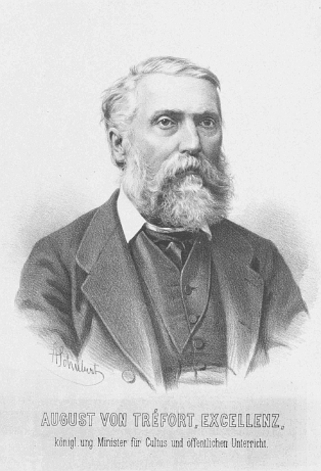 Trefort, Augustin (1817 - 1888) Abgeordneter, Politik, Politiker, Porträt